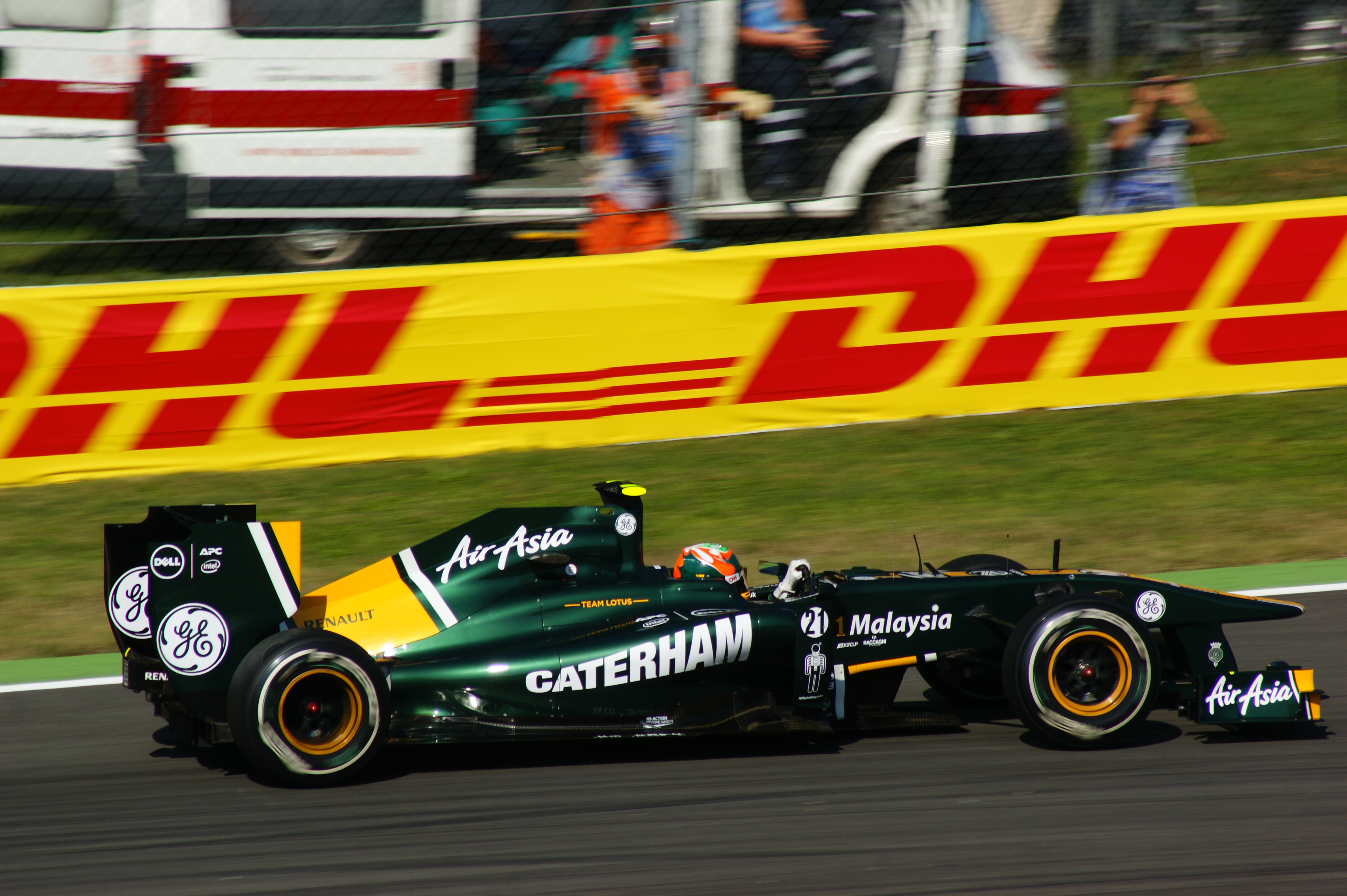 Karun Chandhok alla prima variante Monza 2011